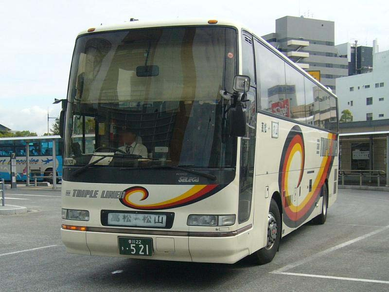 登録番号 香川22き521 四国高速バス所属 坊っちゃんエクスプレス号用 2006年10月2日 高松駅前にて撮影 撮影者 Tokatsu kokubu